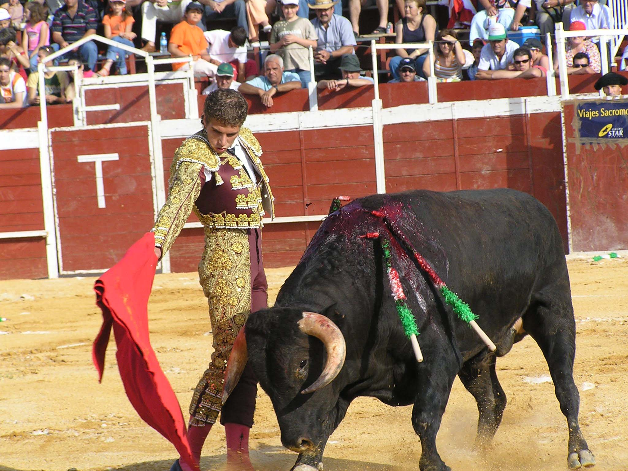 Joven torero en un lance de su corrida, en Alcalá la Real (Jaén, España)